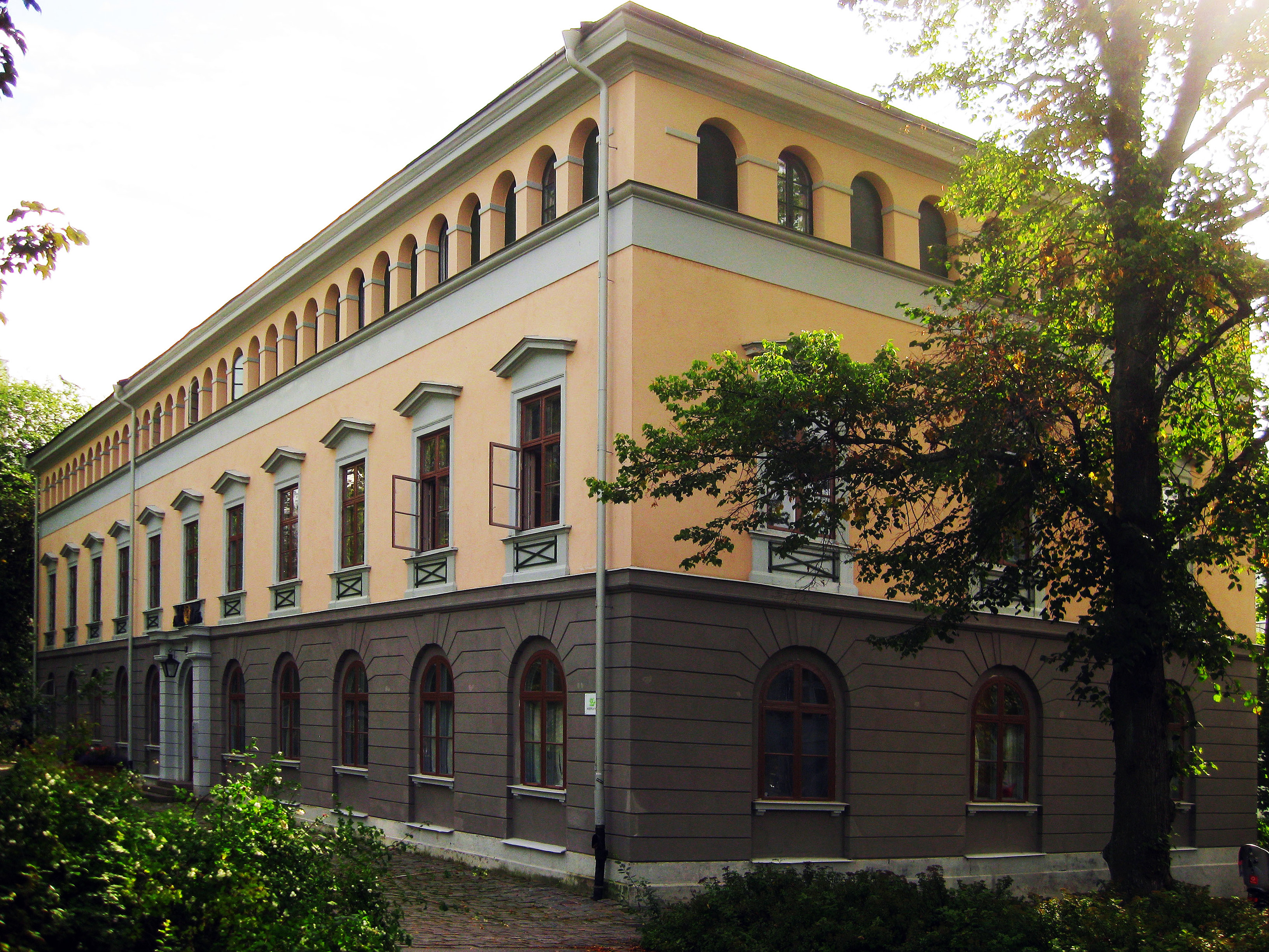 Experimentalfältet (Fredrik Bloms hus) i Universitetet, Stockholm